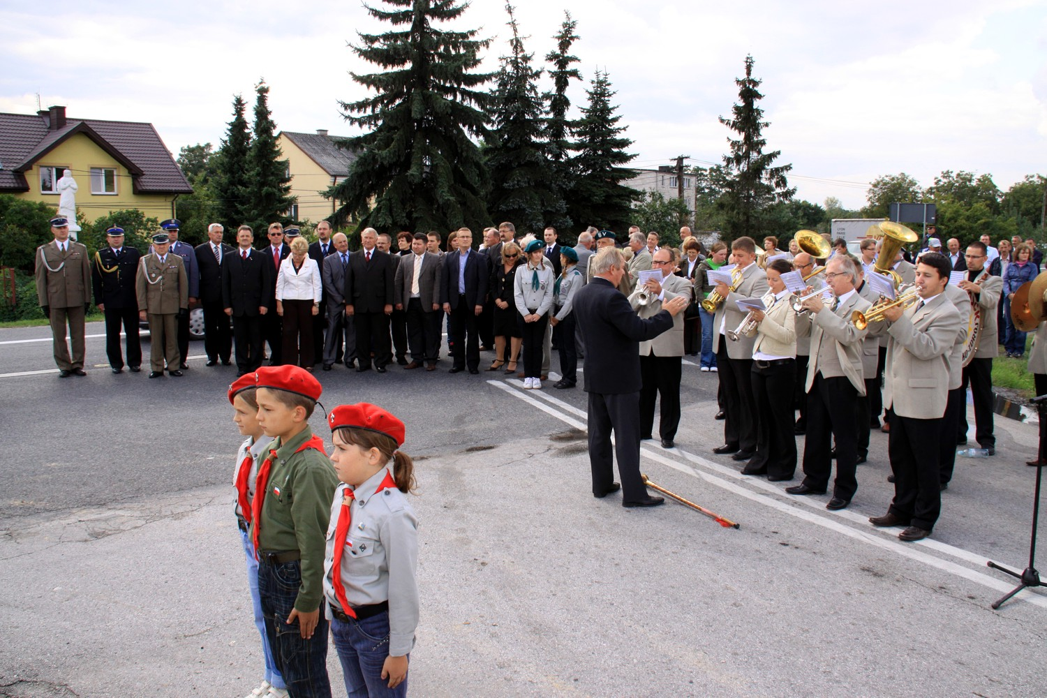 Buska Orkiestra Zdrojowa gra Pieśń Reprezentacyjną Wojska Polskiego podczas uroczystośći w Broninie, w rocznicę stoczonej tu przez 22. Dywizję Piechoty Górskiej bitwy, 9 września 1939 r.